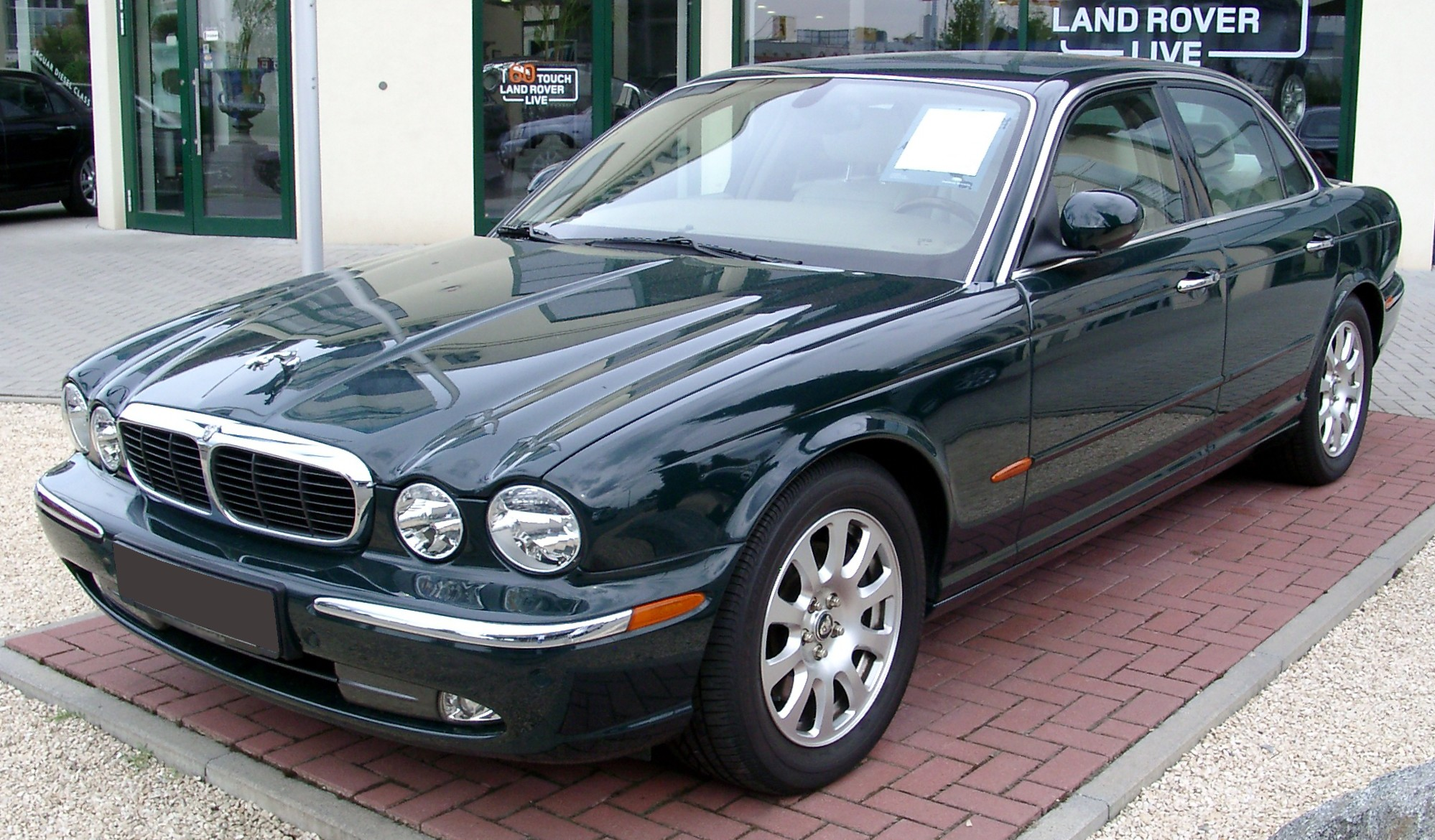 Jaguar XJ6 3.0, Baujahr 2004